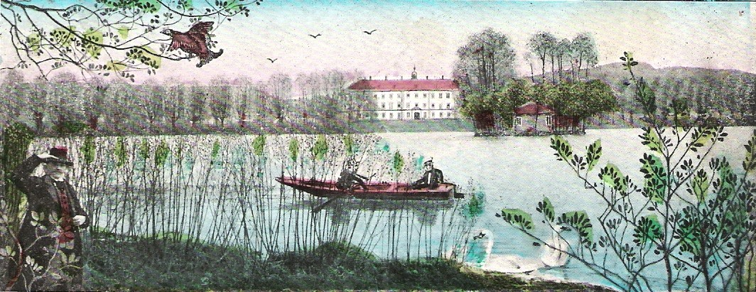 Zámek a Zámecký rybník v Lipové na historické pohlednici